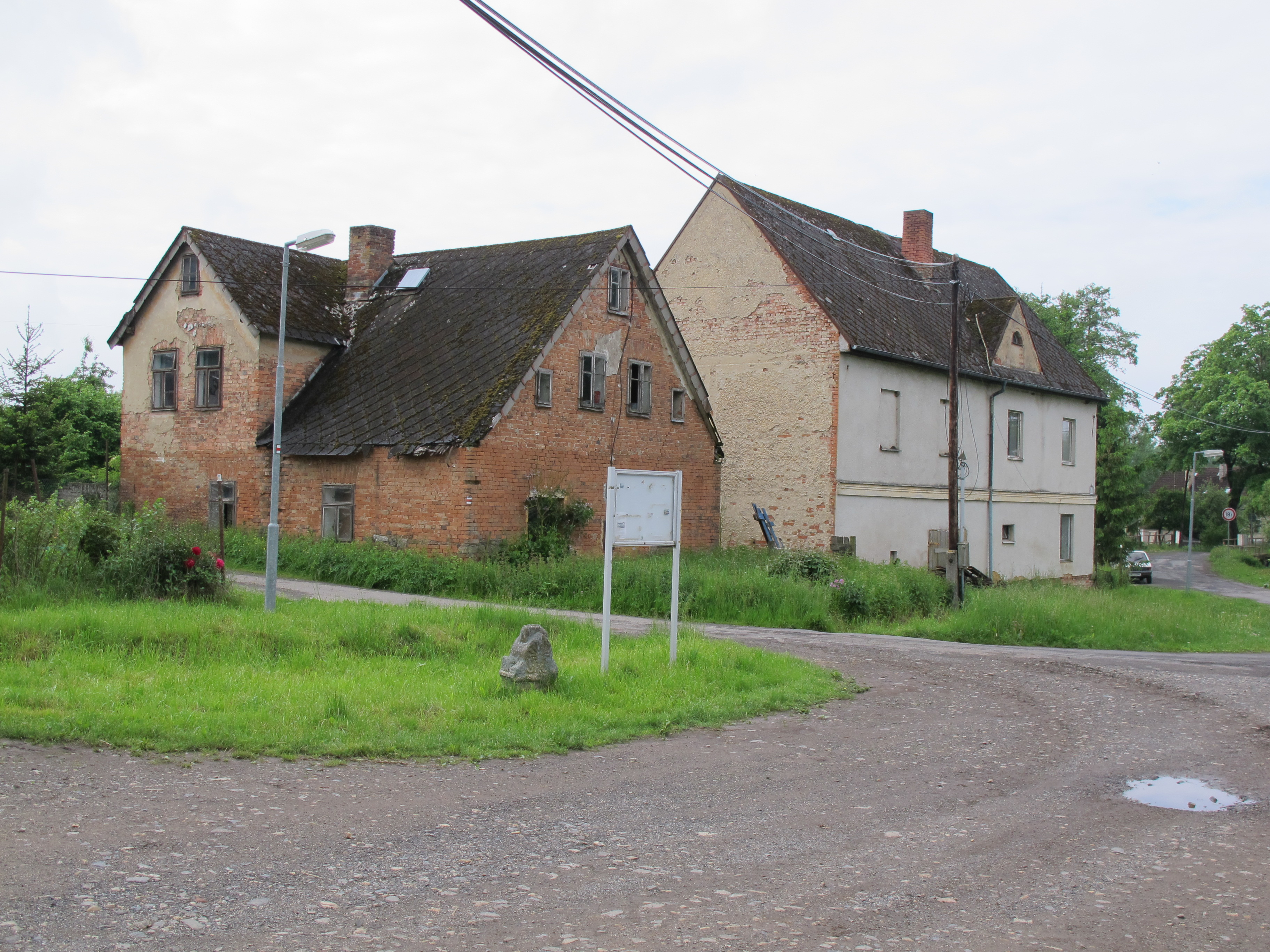 Chotěnov - domy ve vesnici (čp. 2) This image was acquired during the event Wikiměsto Mariánské Lázně.